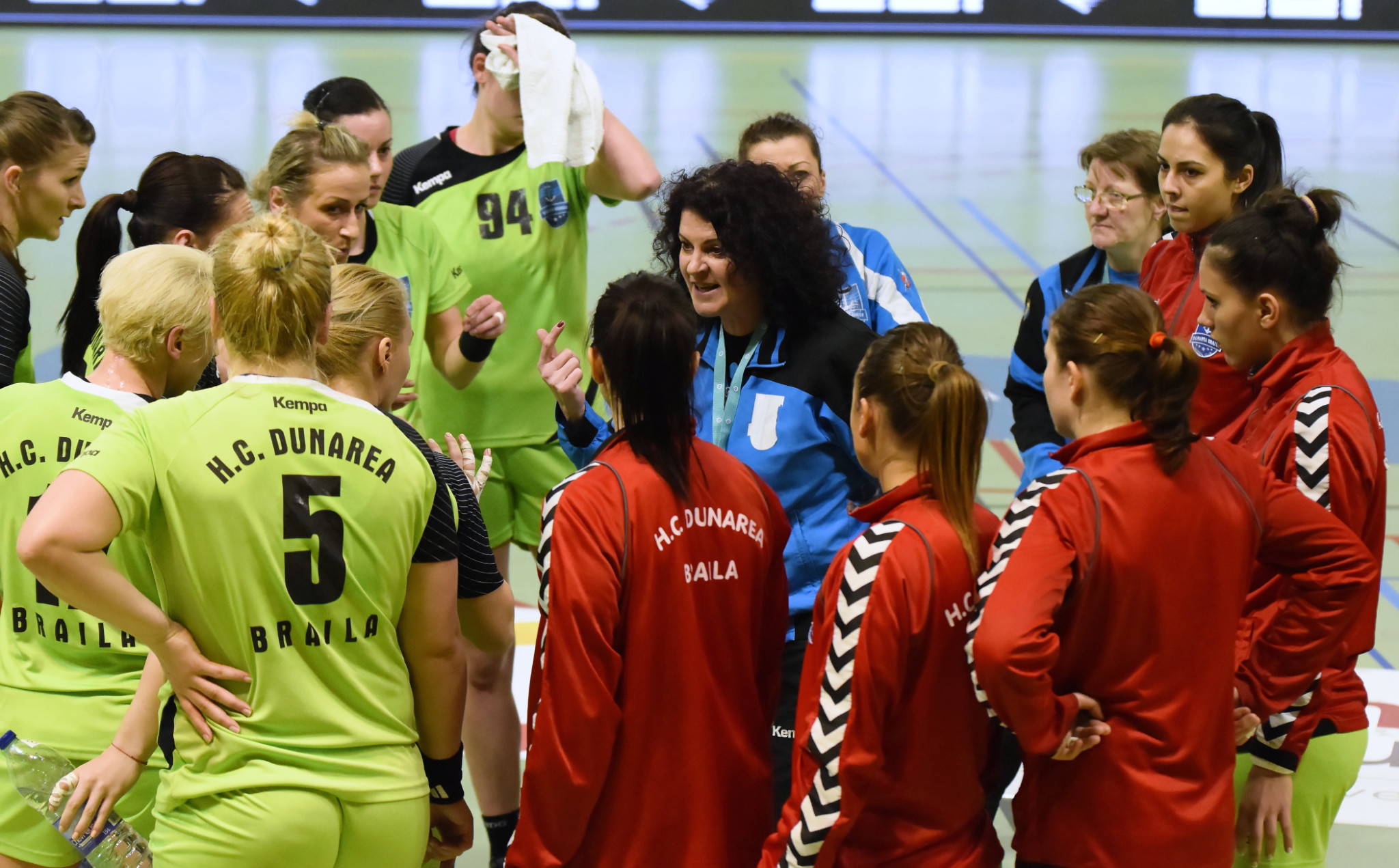 Rencontre de la coupe EHF: Issy Paris Hand / H.C. Dunarea Braila. A Meudon la forêt, le 14 février 2015.